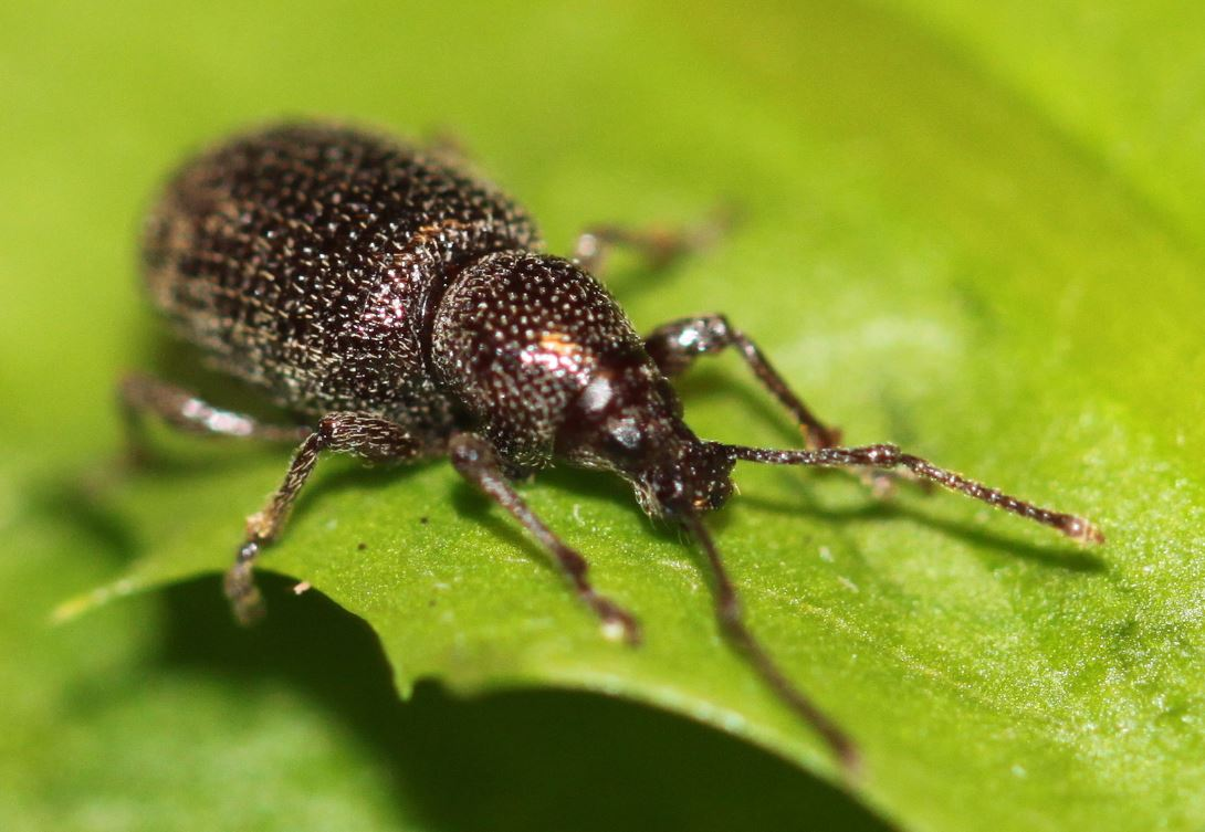 Rüsselkäfer Otiorhynchus cf. cribricollis am 19. Oktober 2018